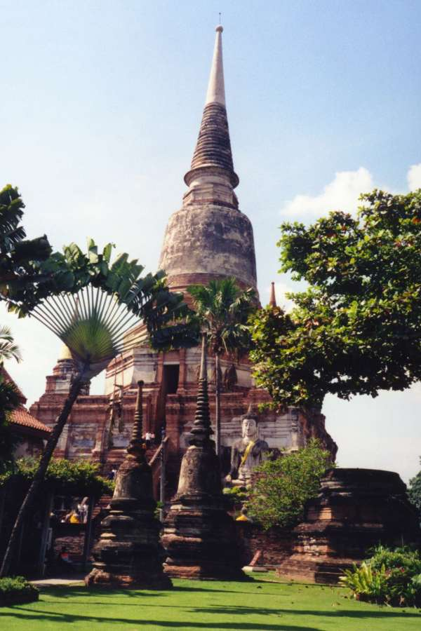 Wat Yai Chai Mongkul, Ayutthaya, Thailand